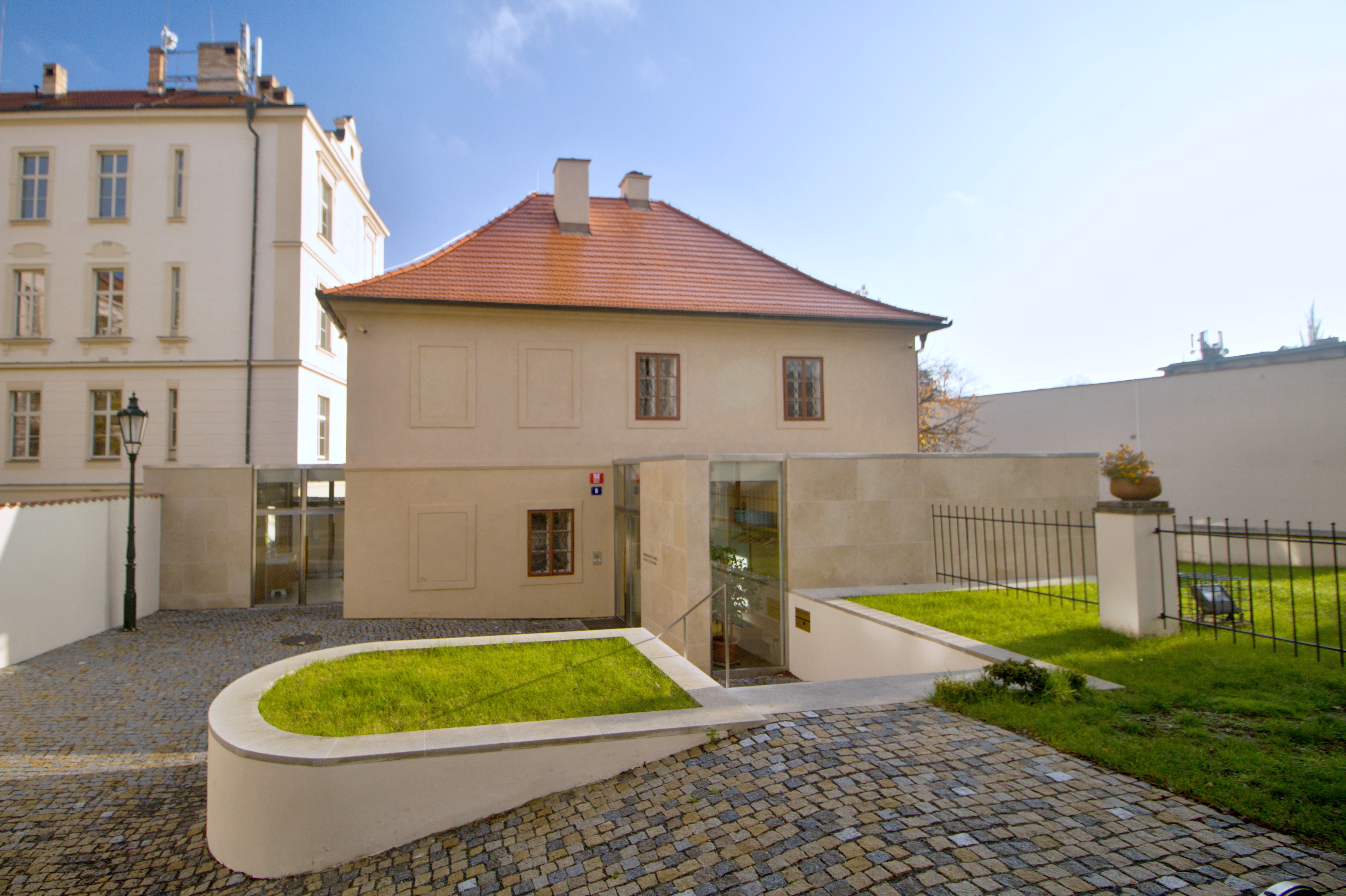 Praha 6-Bubeneč kostel sv. Gottharda